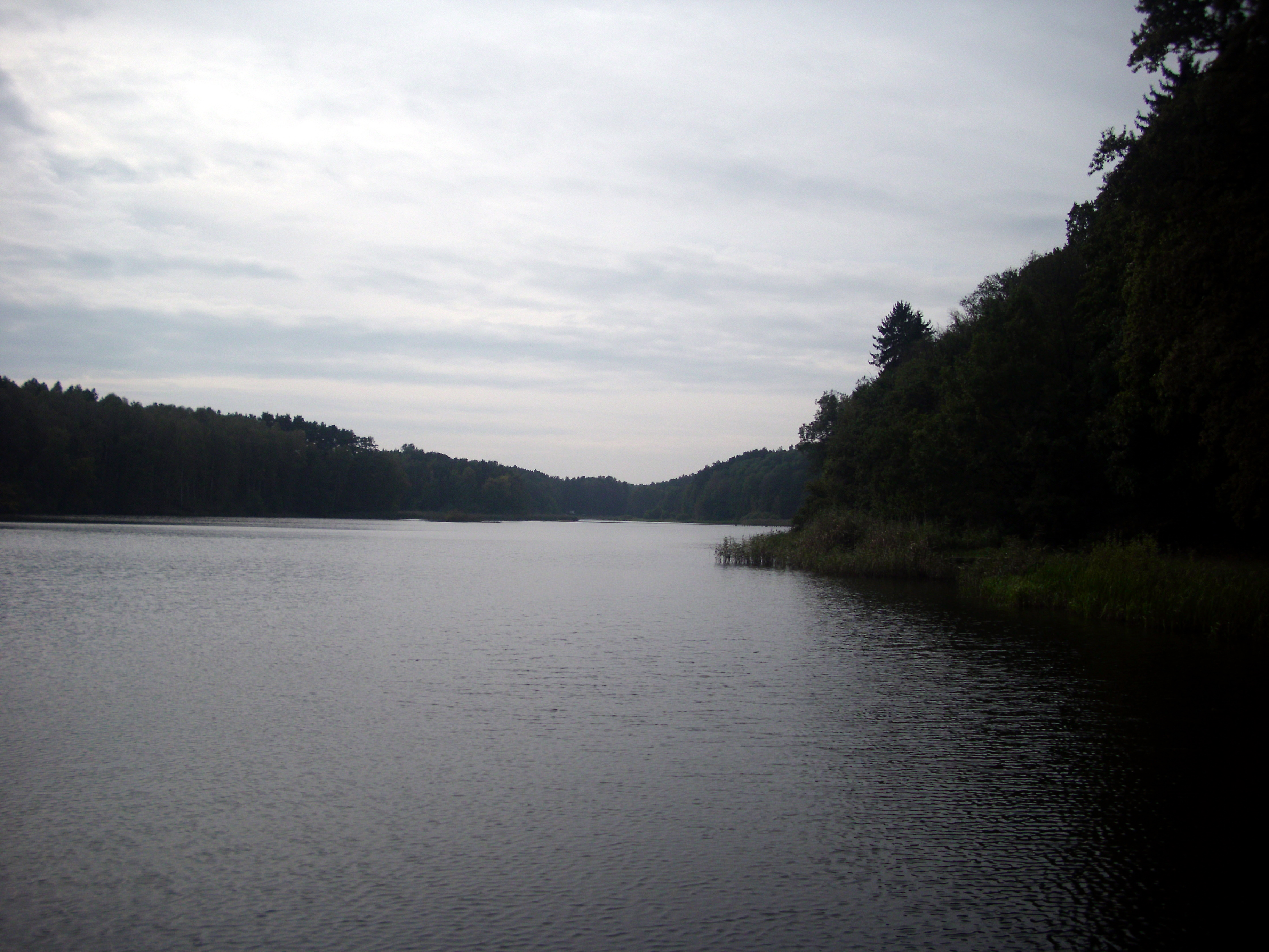 Klingeteich, Klingemühle in Friedland, Naturpark Schlaubetal, Brandenburg